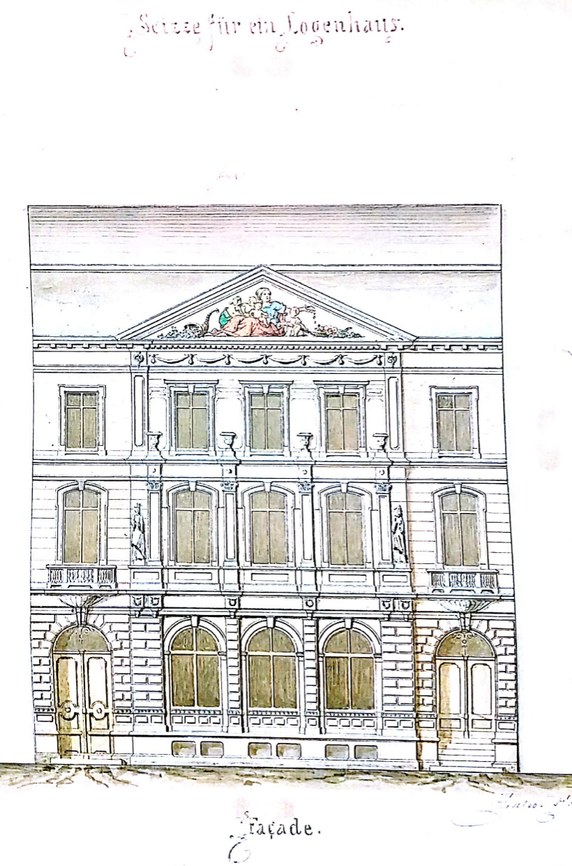 Bild des ehemaligen Logenhauses vor 19Jhd